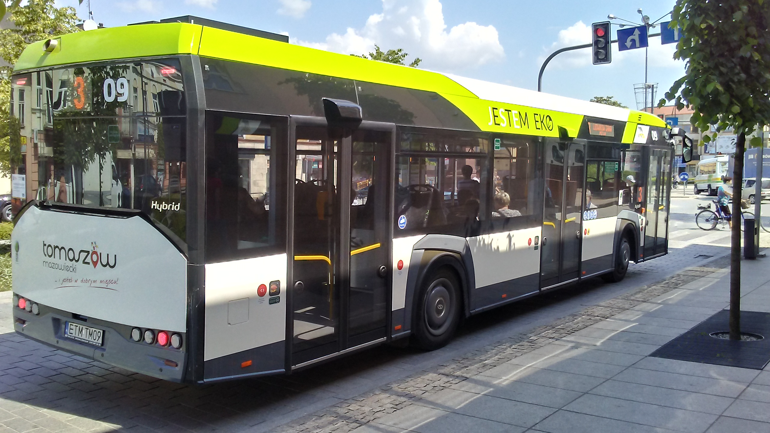 Solaris Urbino 12 Hybrid, jeden z 25ciu autbusów zakupionuych wchodzących w skałd Tomaszowskiego Miejskiego Zakładu Komunikacji